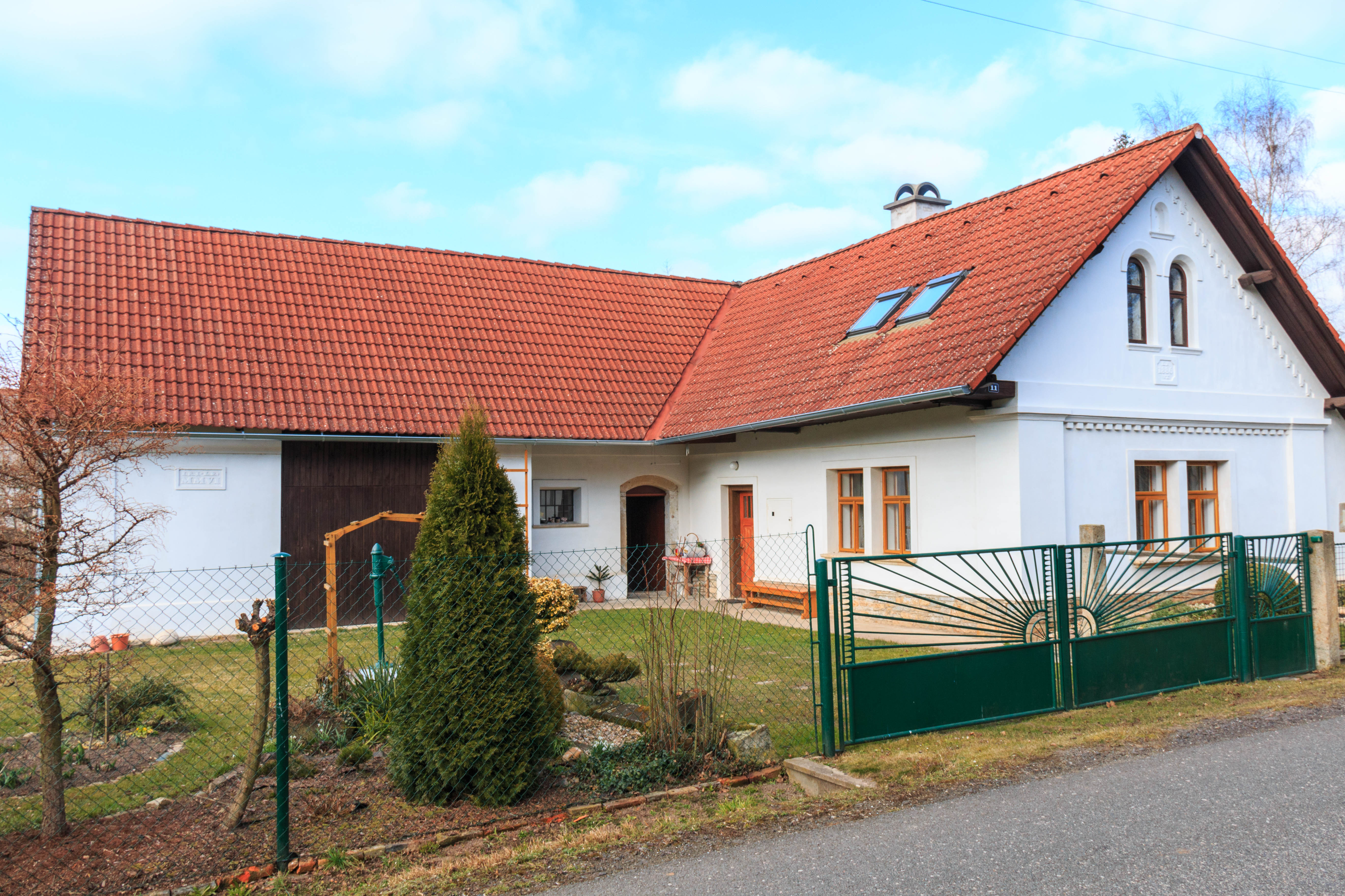 Roztoky čp 11